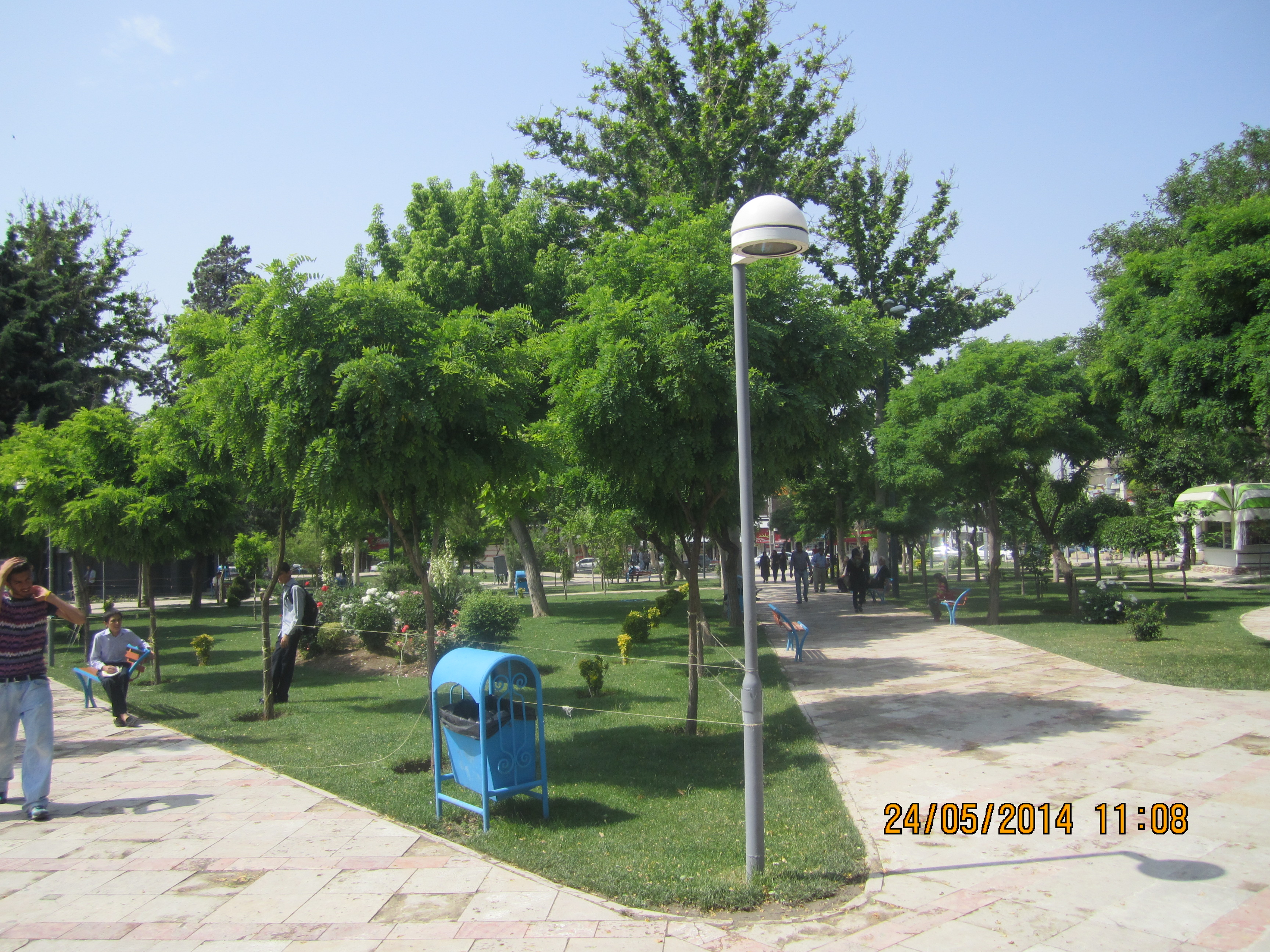 نمایی از پارک ششم در خیابان اصلی گوهردشت